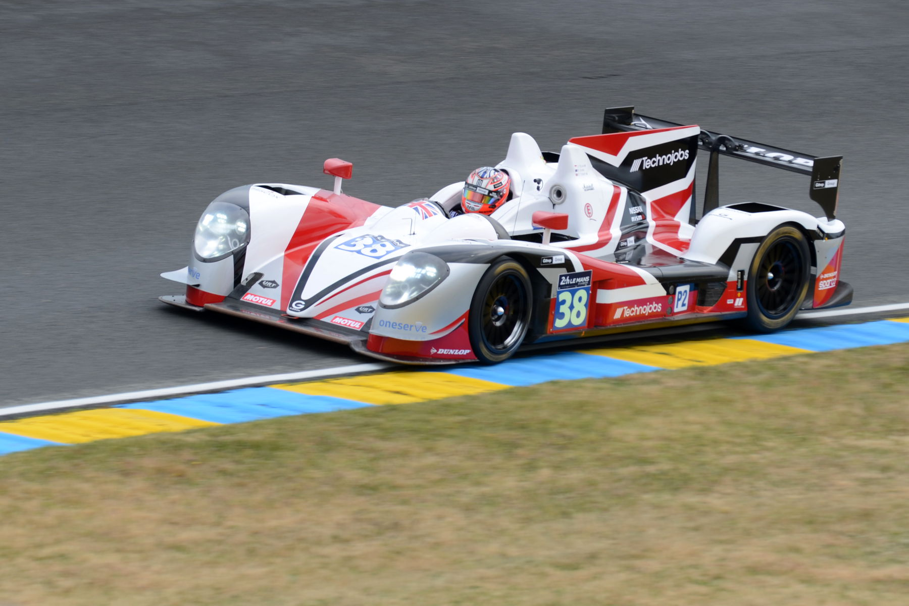 La Gibson 015S - Nissan de l'écurie Jota Sport par Simon Dolan, Mitch Evans et Oliver Turvey lors des 24 Heures du Mans 2018